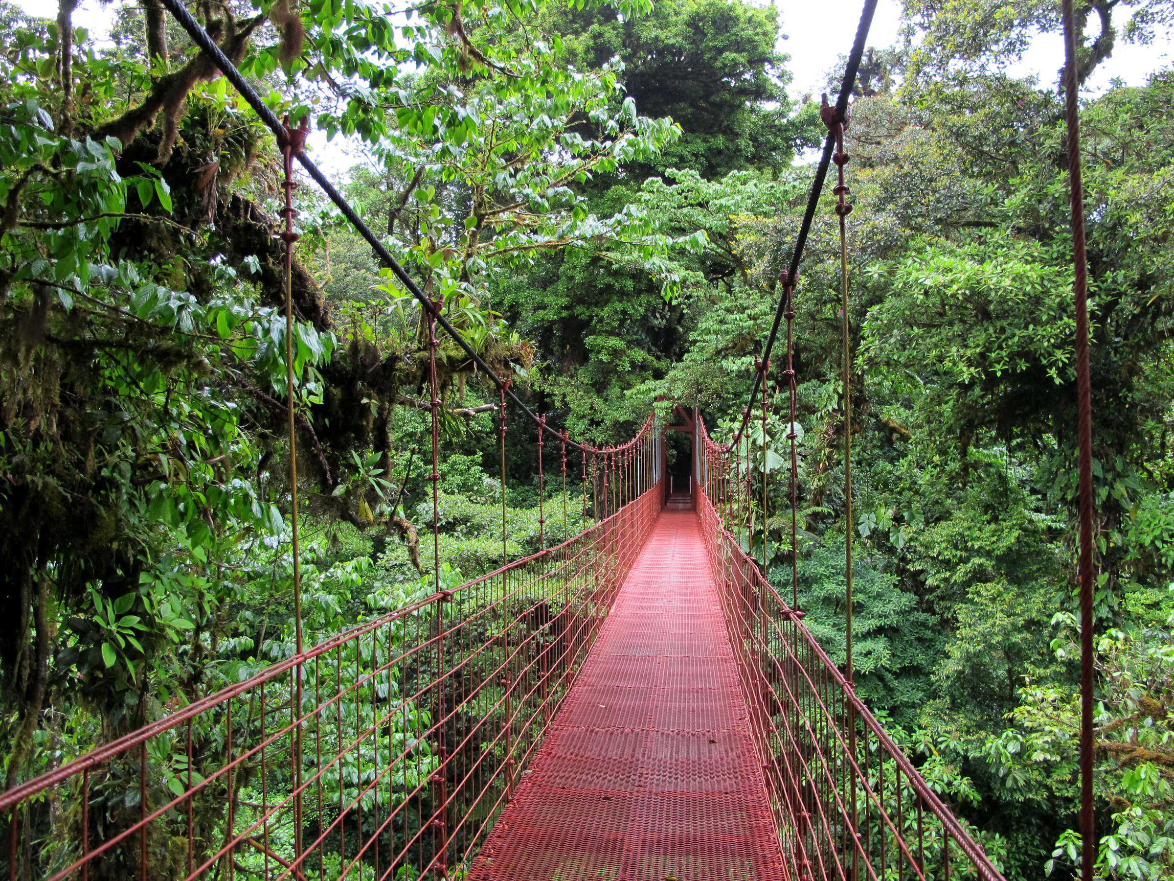 Hengebru i Monteverde biologiske reservat i Costa Rica